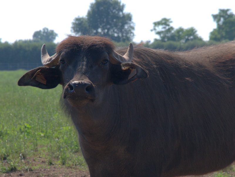 Aus Campania kommt der Original Mozzarella die Bufale. Wir hatten uns ausgerechnet die eine Käserei zum Besuch ausgesucht, die Partout nicht mit dem Navi zu finden war. Hat uns mehr oder weniger den ganzen Tag gekostet, da wir ausser den Tempeln und der Suche nach dem Käse nicht mehr viel machen konnten, da Paestum doch recht weit ist von Neapel und wir auf dem Hinweg kurz vor Salerno in einen Stau gerieten.